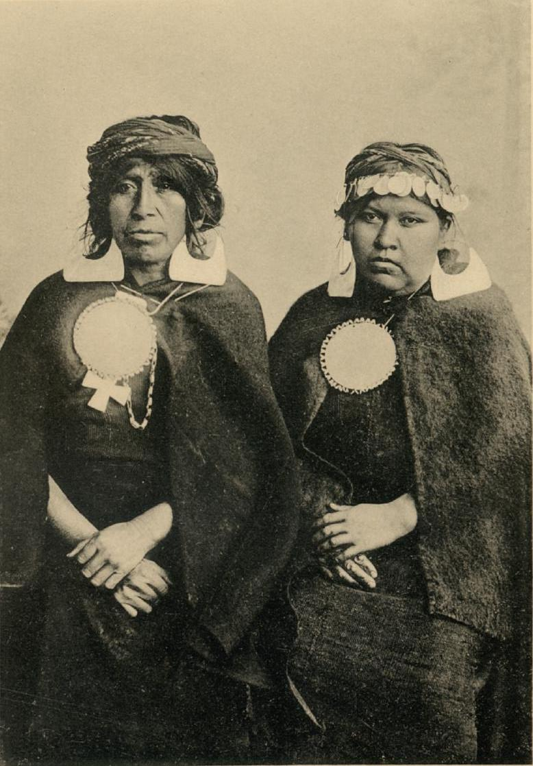 Mujeres Mapuches por Gustav Milet Ramírez. Colección particular, c. 1890.